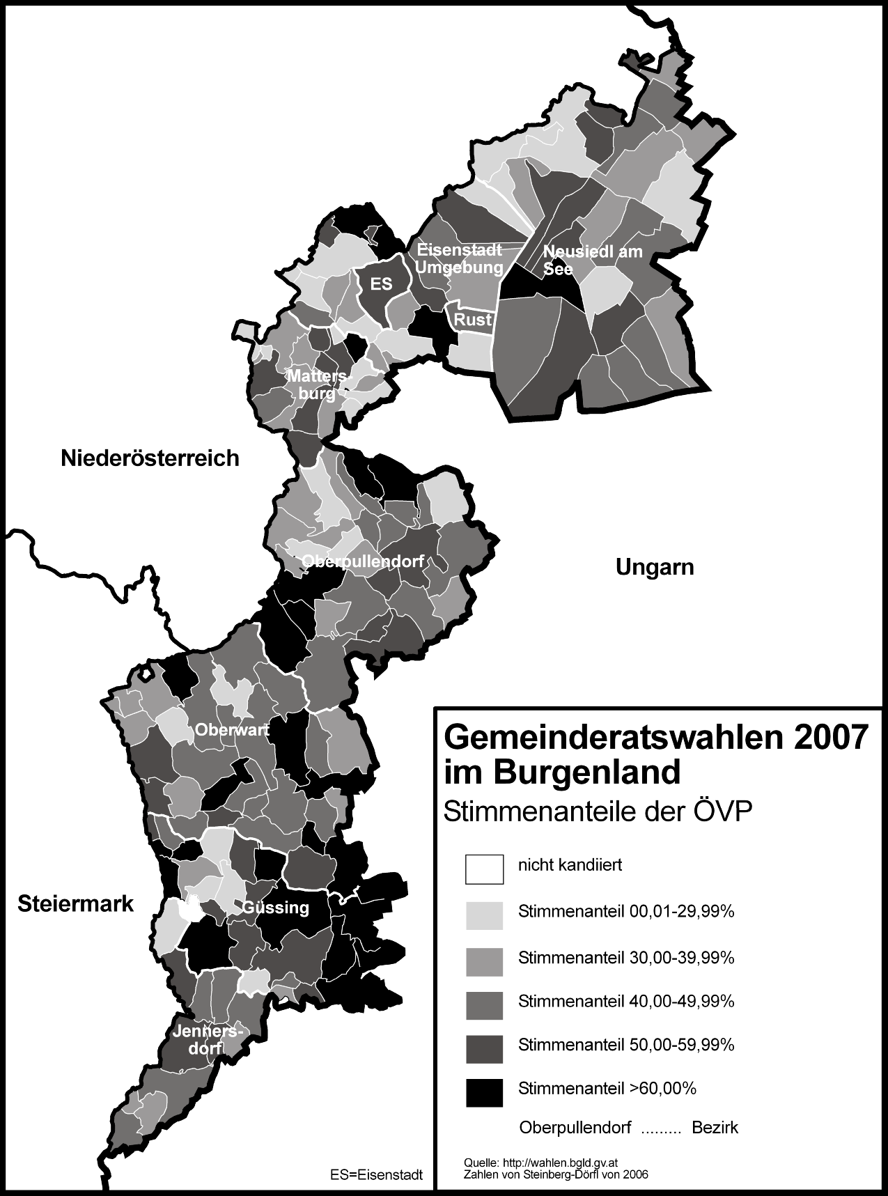 Stimmenanteile der ÖVP bei den Gemeinderatswahlen 2007 im Burgenland